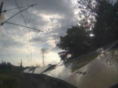 Umgestürzter ET 5, aufgenommen vom Führerstand des ET 6 durch eine fest installierte Kamera.